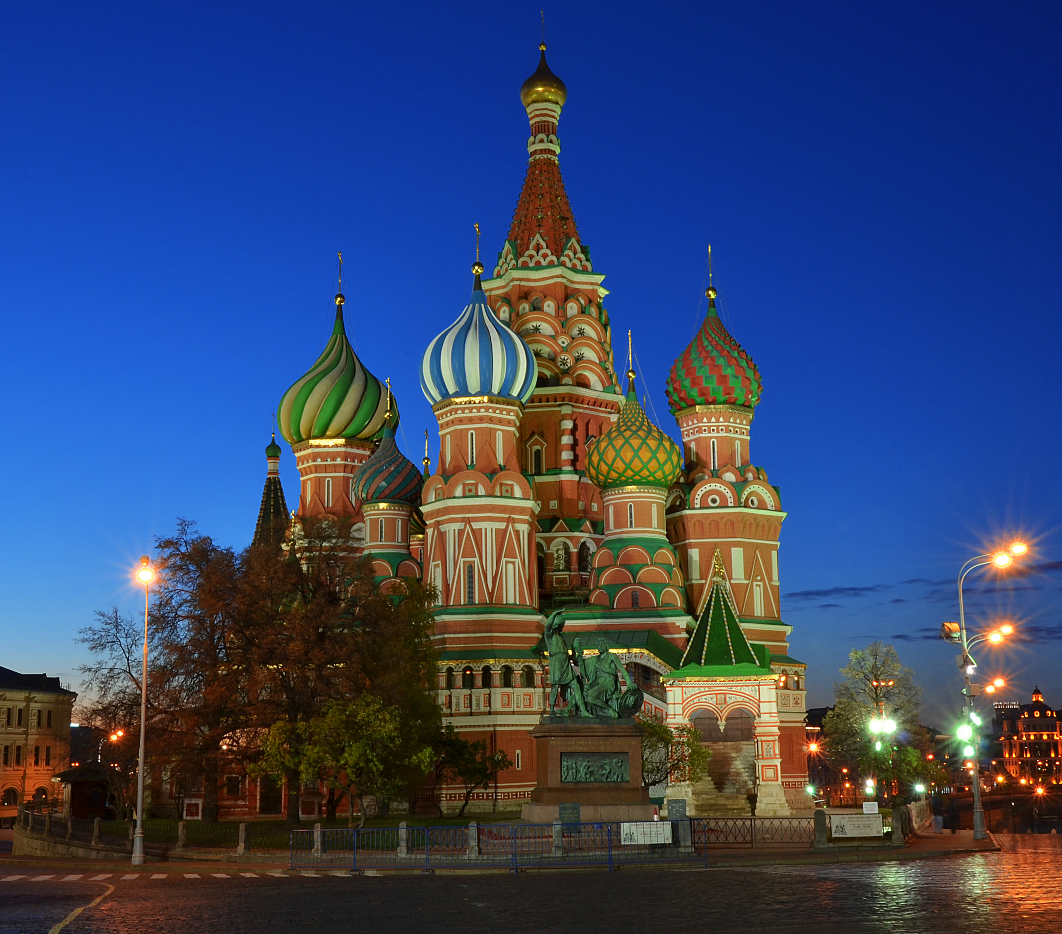 Можно увидеть здесь